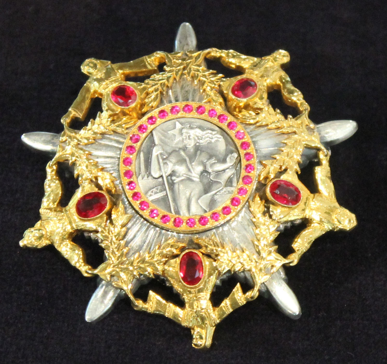 Орден јунака социјалистичког рада на изложби „Одликовања из архива Историјског архива Београда“. Licensing